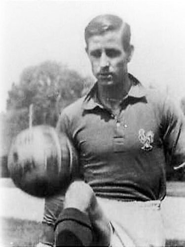 Raymond Kopa, Franse voetballer.